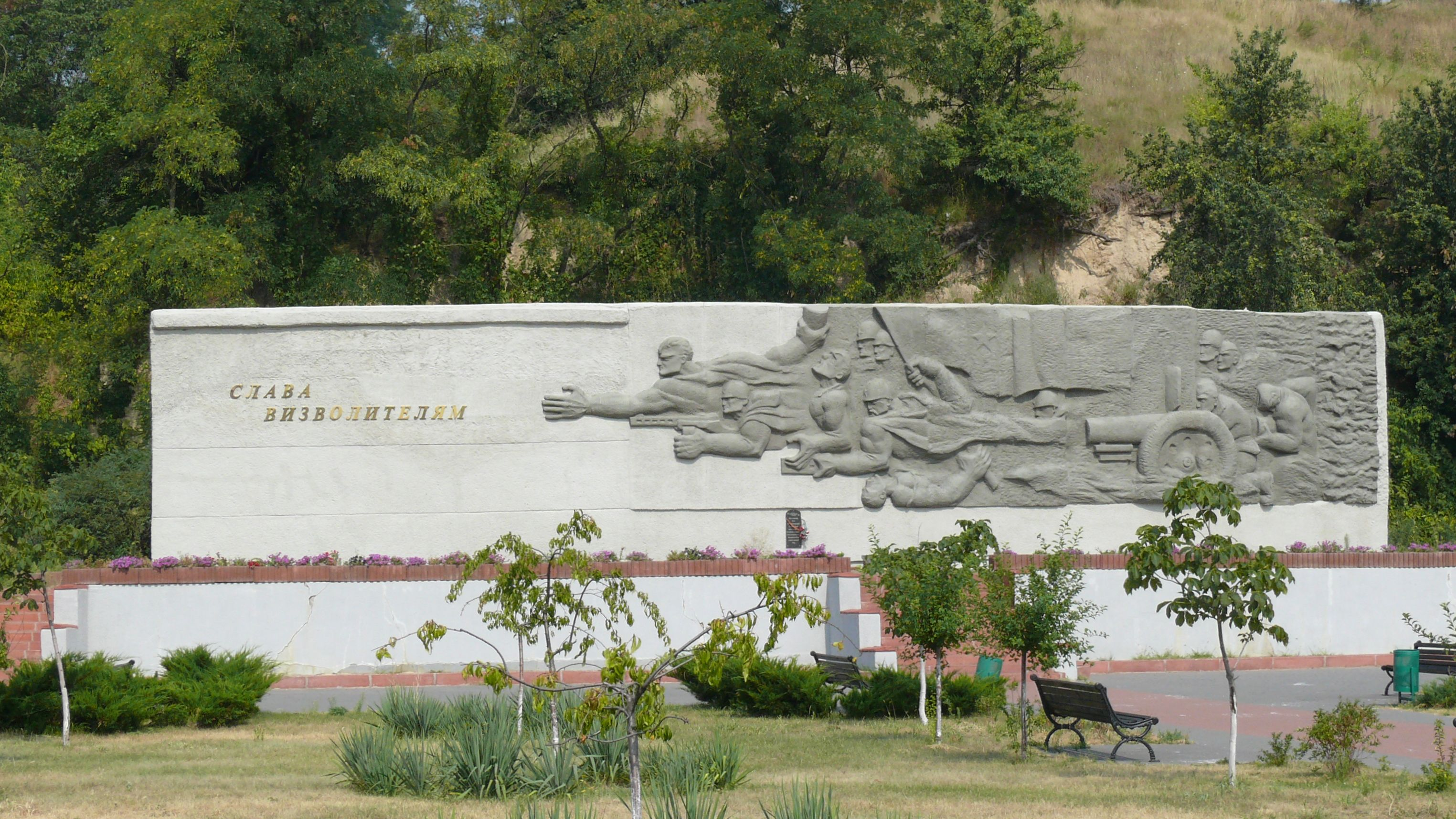 167-й стрелковой дивизии.